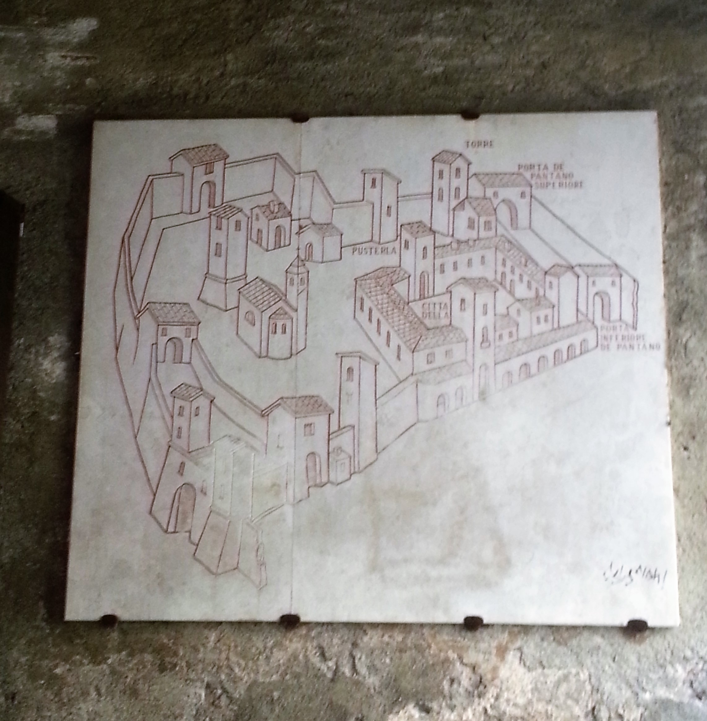 Ingressi della città nel XIV secolo